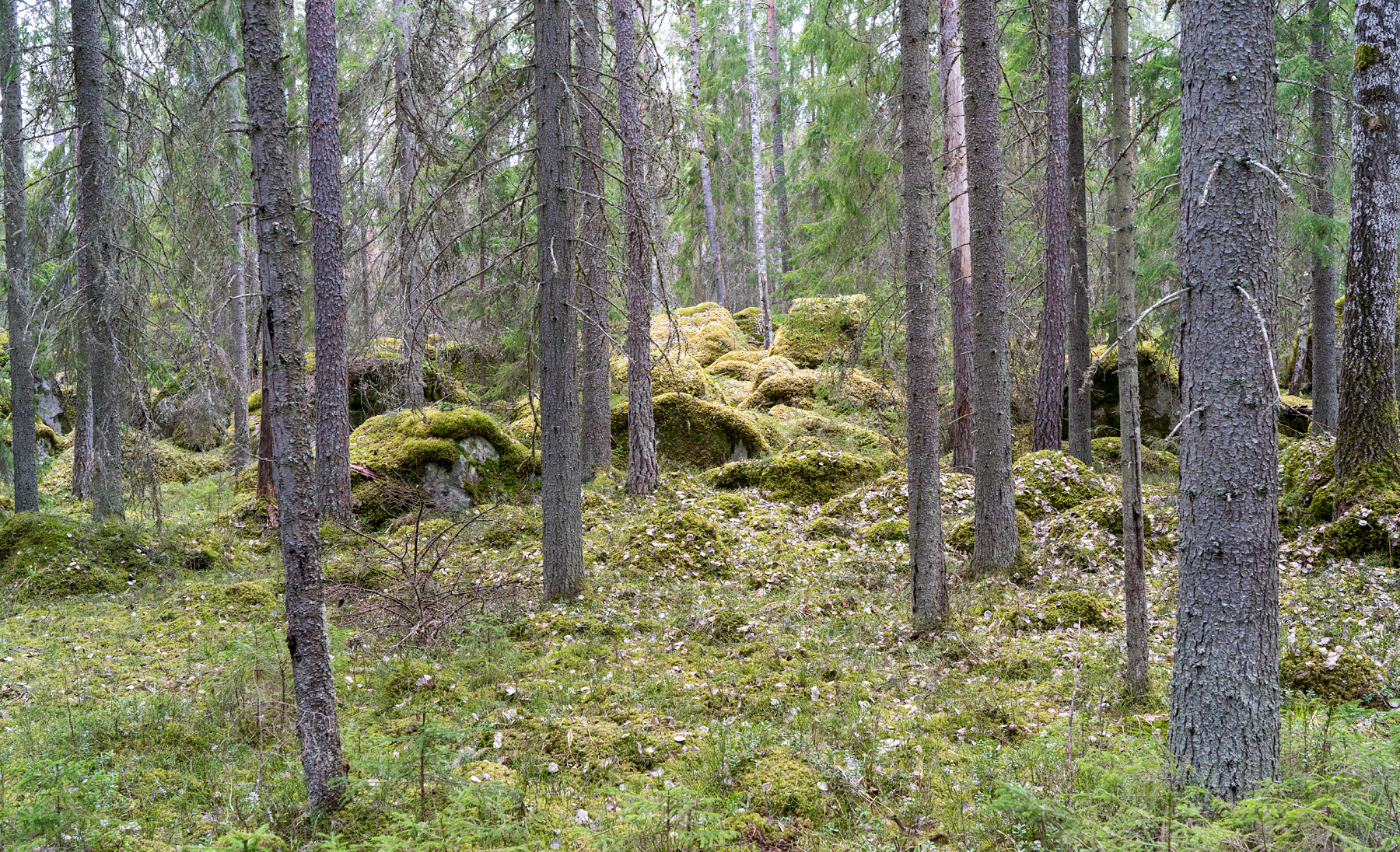 Ölstabrändans naturreservat präglas av blockrik terräng.